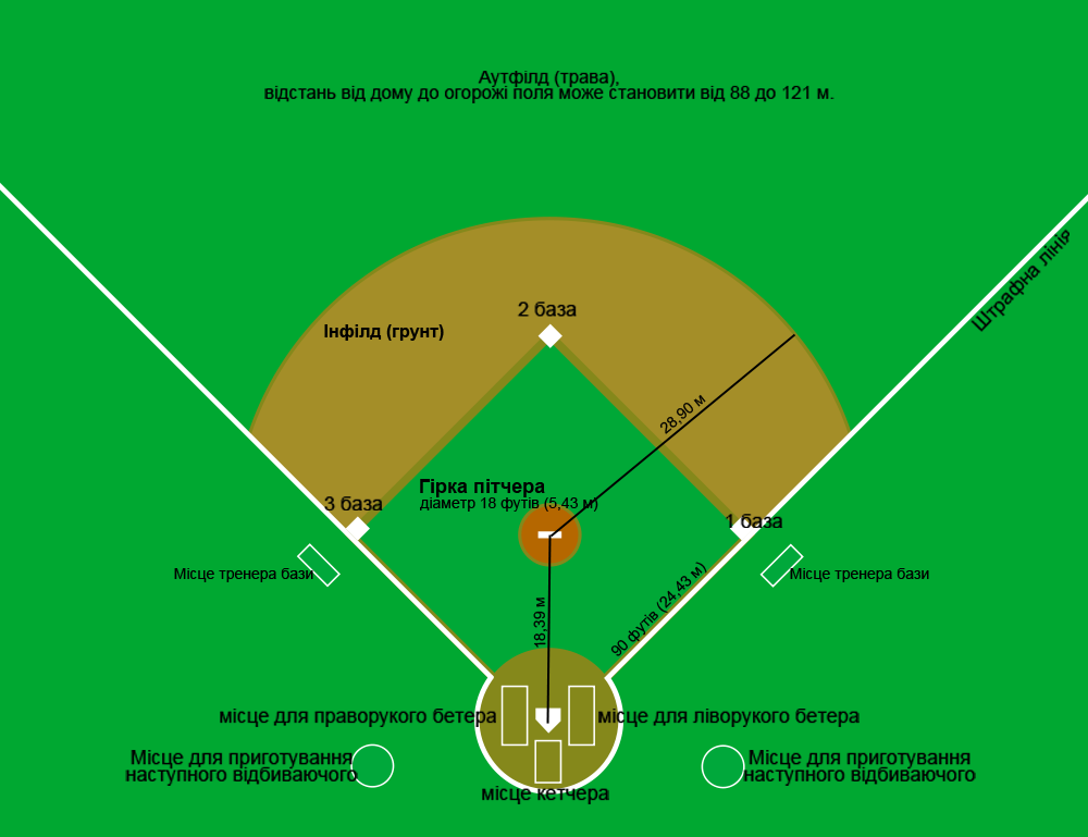 Бейсбольне поле з позначками і розмірами